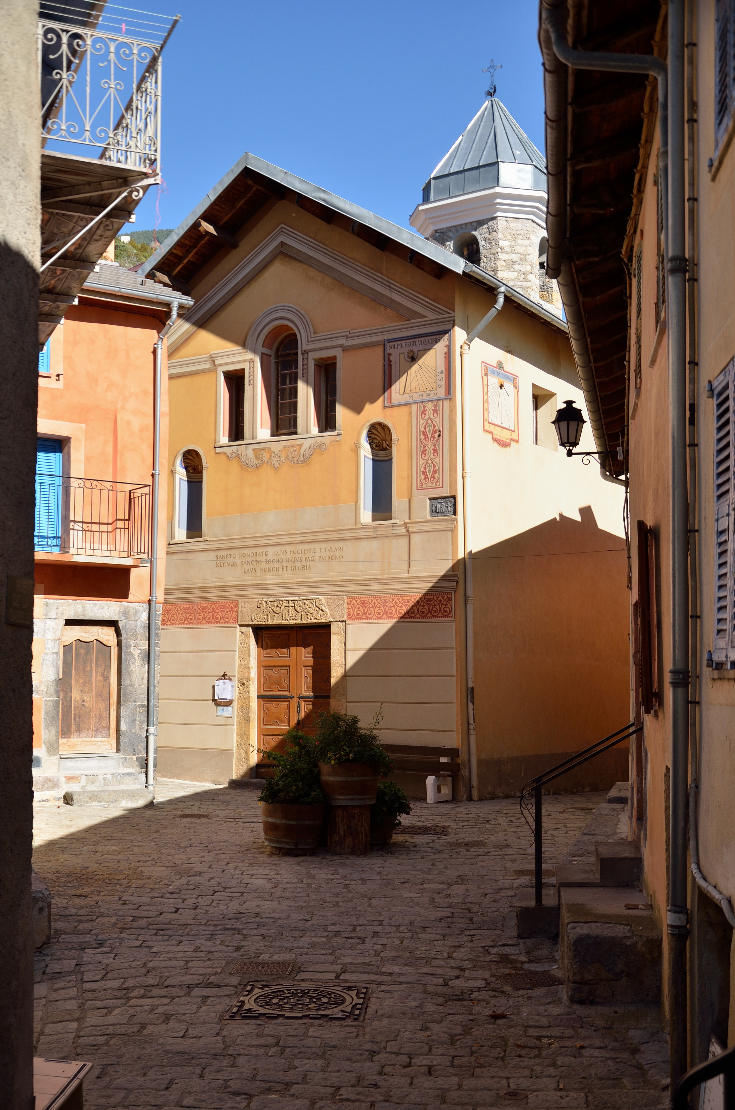 Église Saint-Honorat, à Rimplas (Alpes-Maritimes)